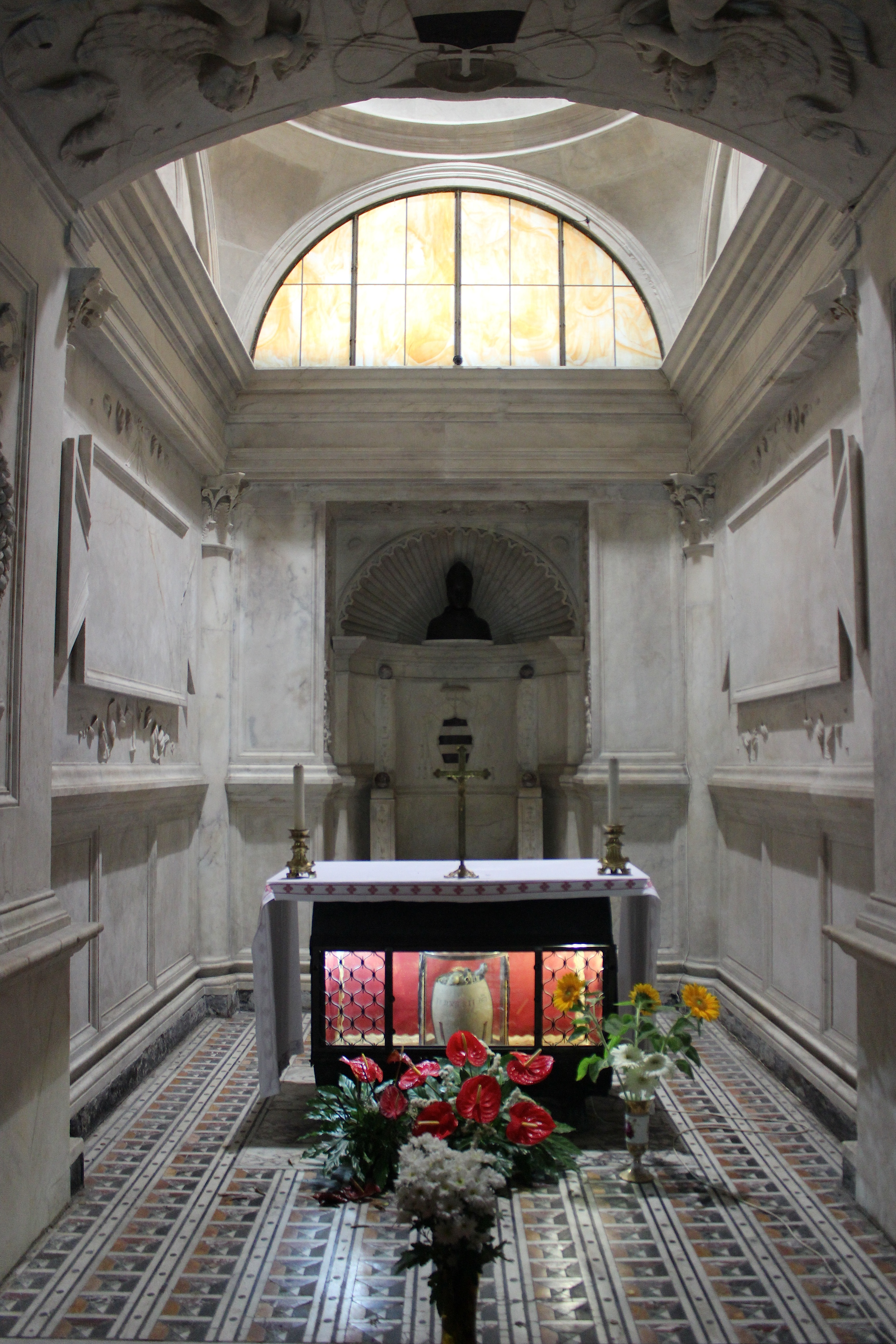 Catedral de Nápoles, cripta bajo el presbiterio.